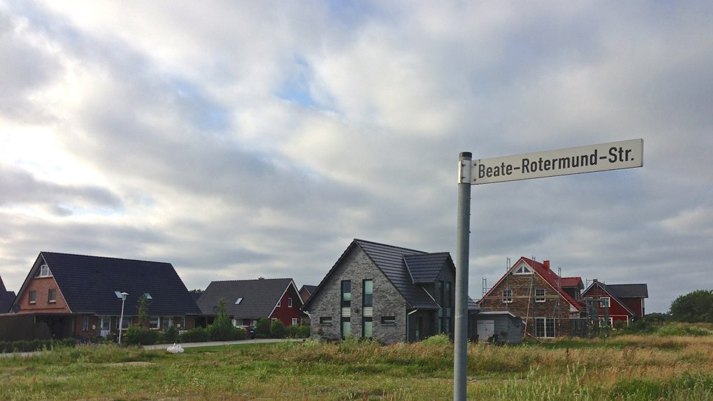 Flensburger Straßenschild Beate-Rotermund-Straße im Orstteil Hochfeld